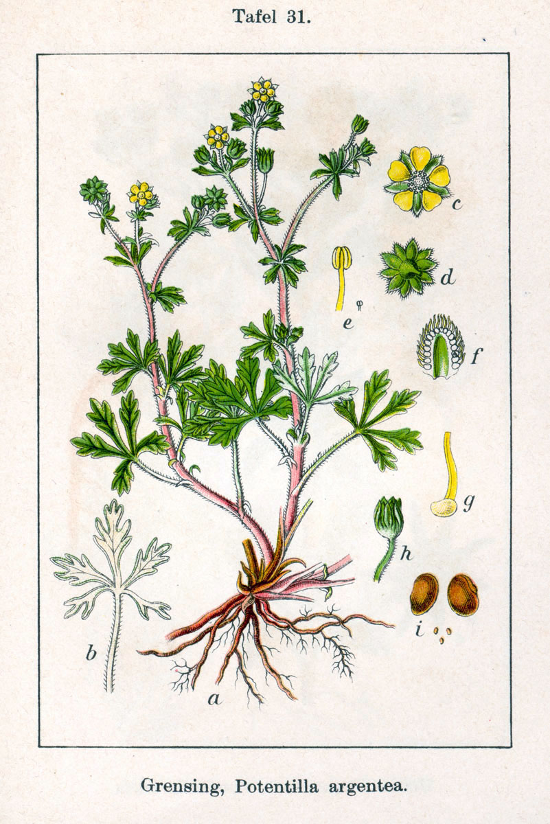 Potentilla argentea L. s. str. Original Description Grensing, Potentilla argentea